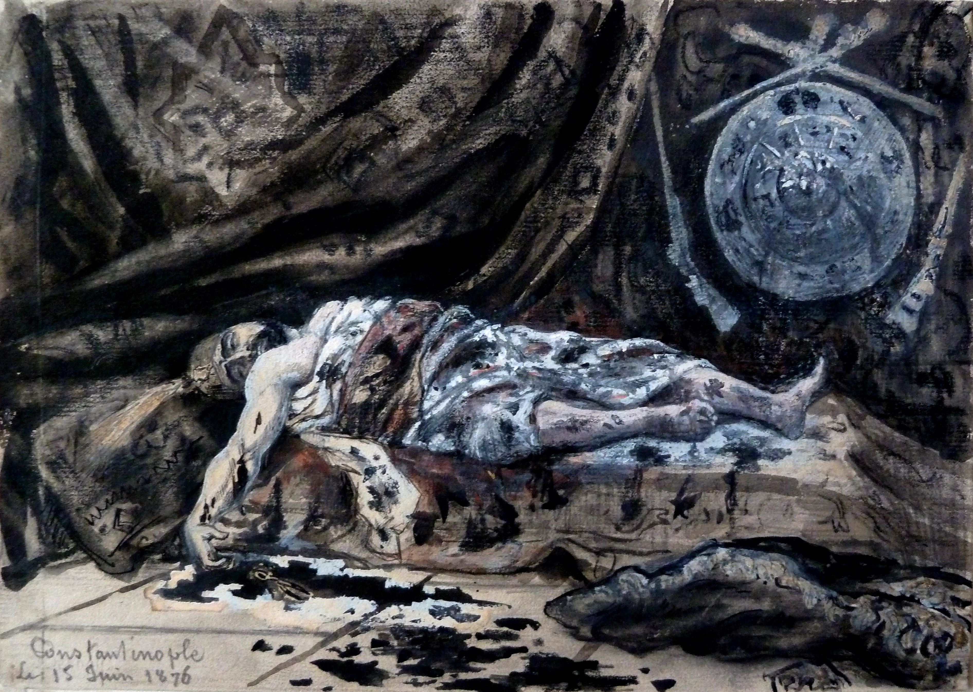 Aquarelle représentant le cadavre du sultan le jour où il fut retrouvé mort dans son palais à Téhéragan, comme l'indique sa note en bas à gauche de l'oeuvre